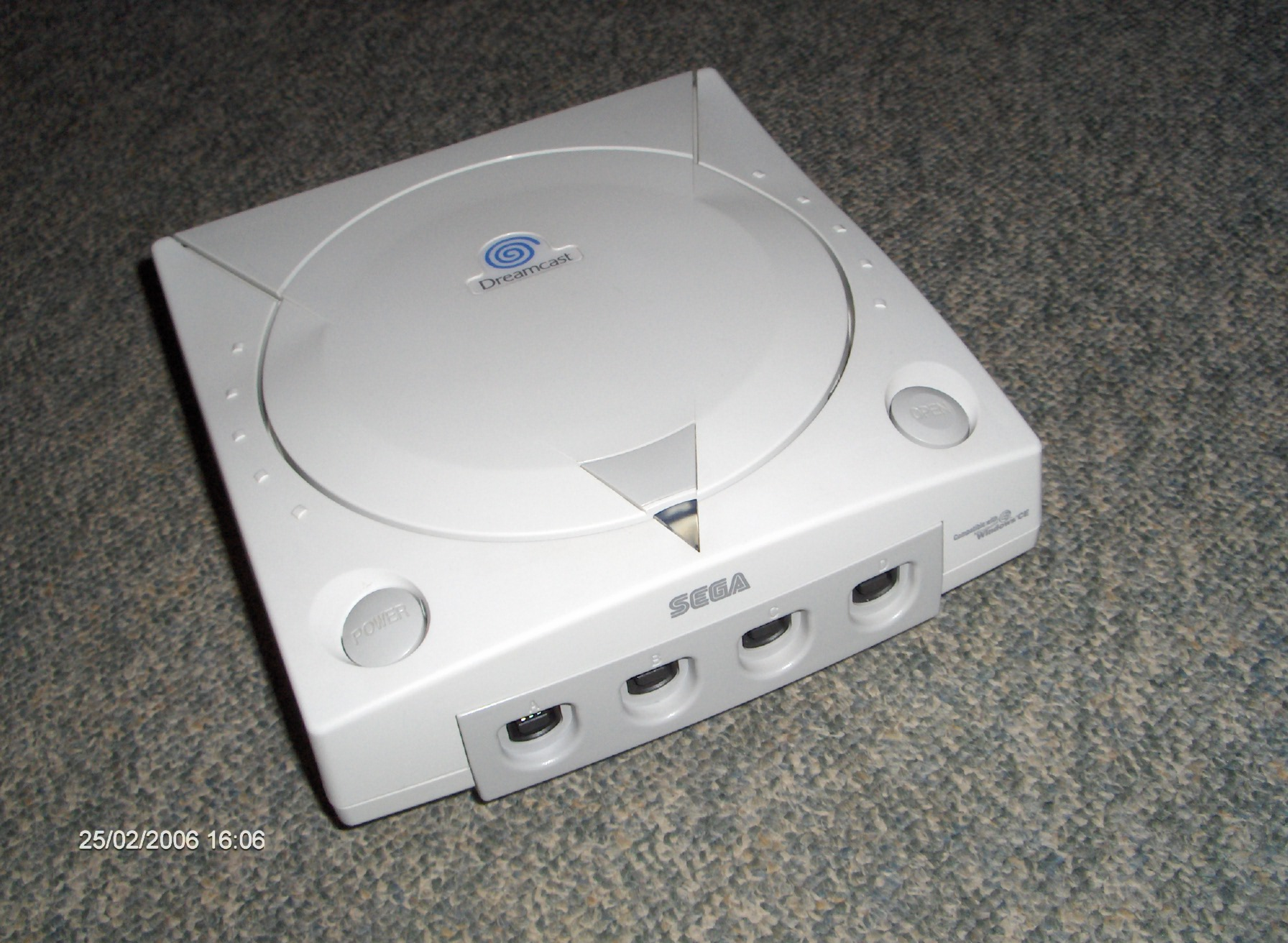 Mijn eigen Sega DreamCast.